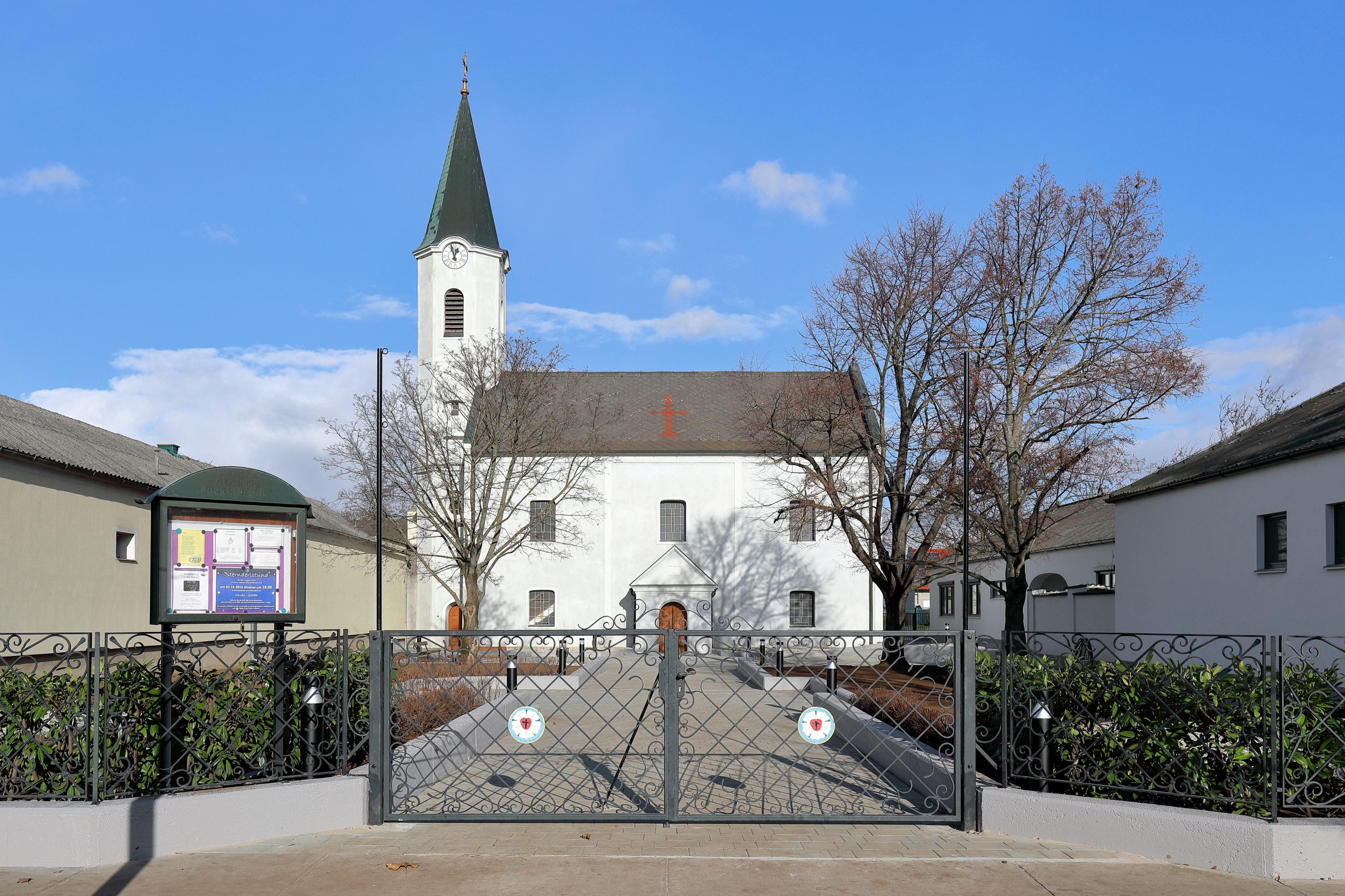 Südwestansicht der evangelischen Pfarrkirche in der burgenländischen Gemeinde Nickelsdorf.Die Kirche bzw. das Bethaus wurde 1787 errichtet und am 11. Oktober 1787 geweiht. Nachdem ab 1791 evangelische Kirchen auch einen Turm und ein Geläute haben durften, wurde 1797 die erste Glocke angekauft und in einem Holzgerüst aufgezogen. 1823 erfolgte an der Nordwestfassade der Anbau eines achteckigen Turmes mit Glockenstube und Spitzhelm. 1975 wurden die Gebäude vor der Kirche abgerissen, so dass ein großer Kirchenvorplatz entstand.